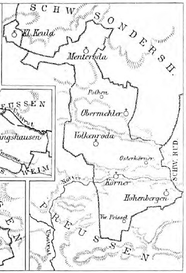 Karte zum Amt Volkenroda.